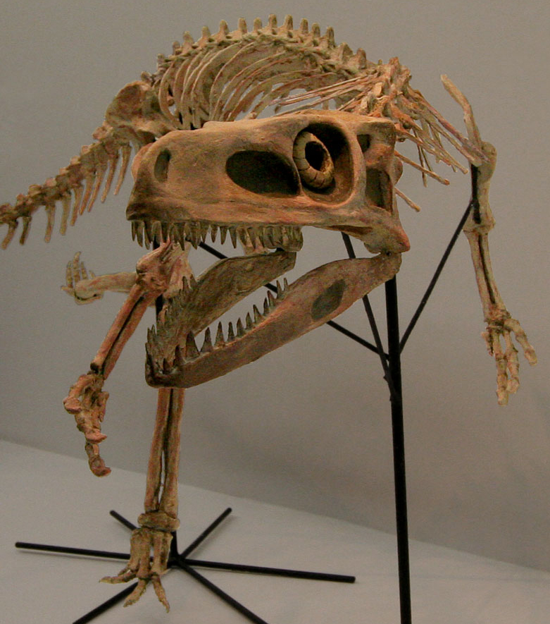 Staurikosaurus - 02